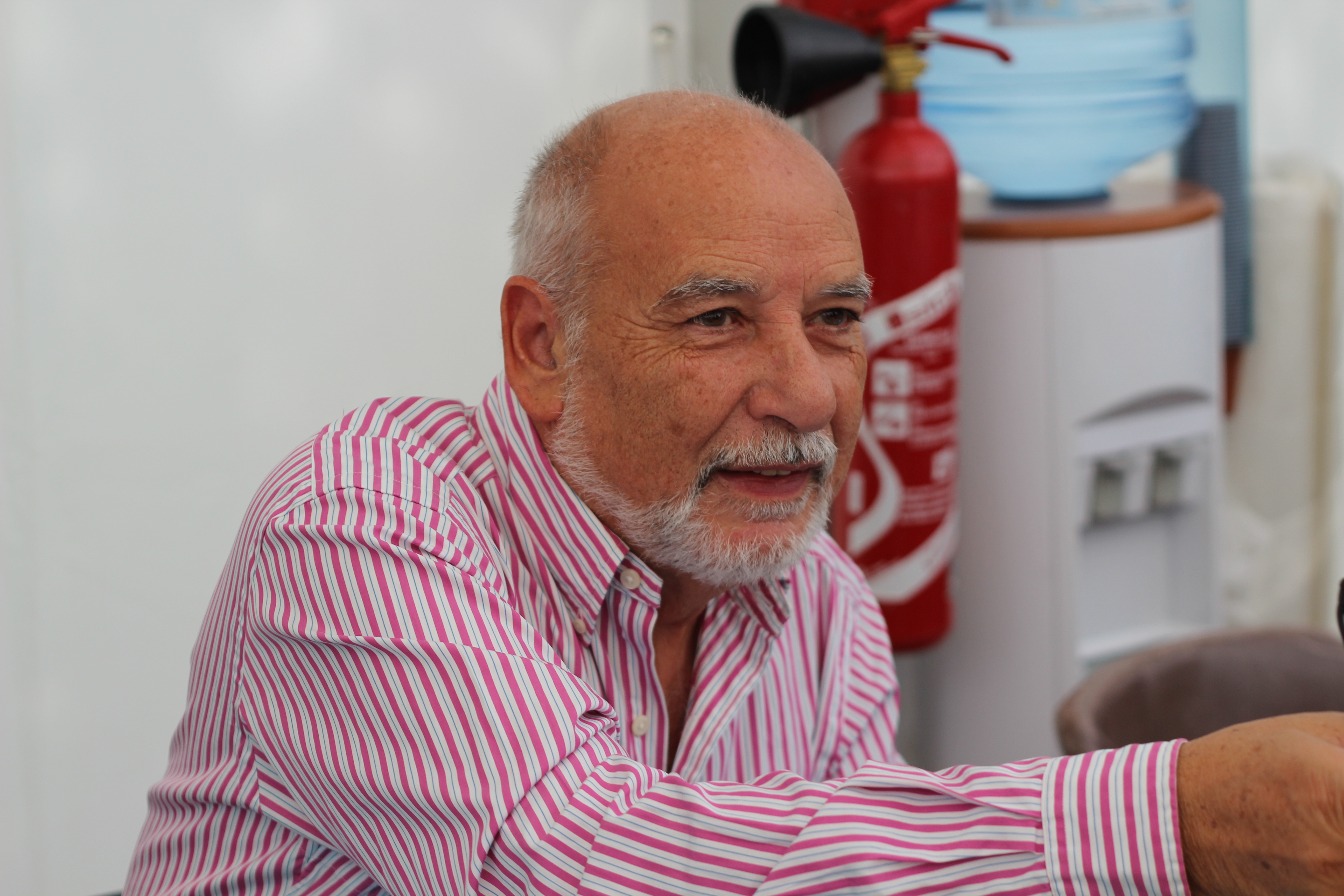 Tahar Ben Jelloun - Livre sur la Place 2014